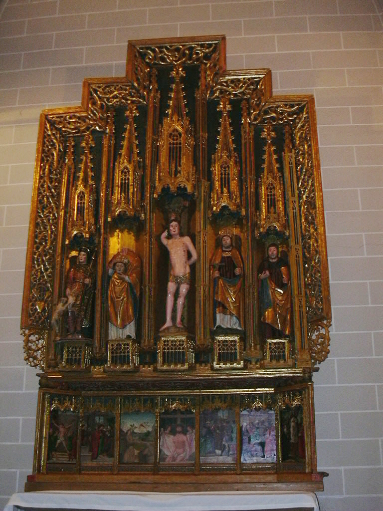 Retablo de San Sebastián. Colegiata de Bolea (Huesca, España)